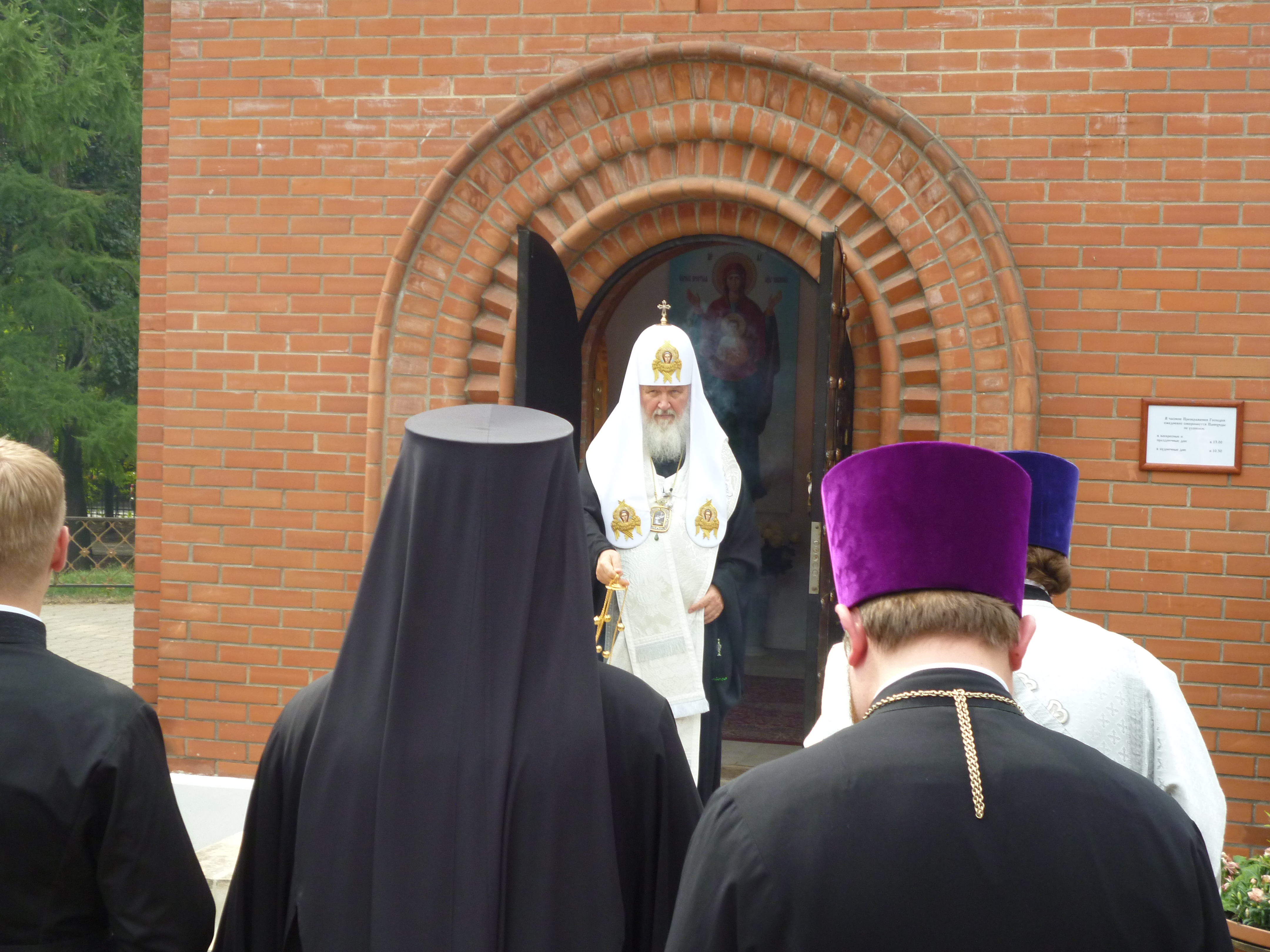 Патриарх Кирилл в Мемориальном парке совершает заупокойную молитву в часовне Спаса Преображения